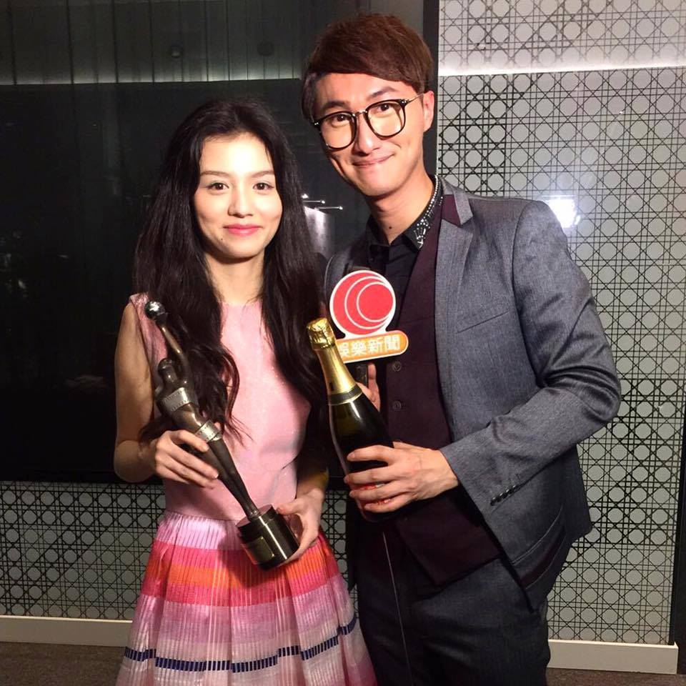 粵語: 嚴崇天採訪第35届香港電影金像獎最佳女主角-春夏